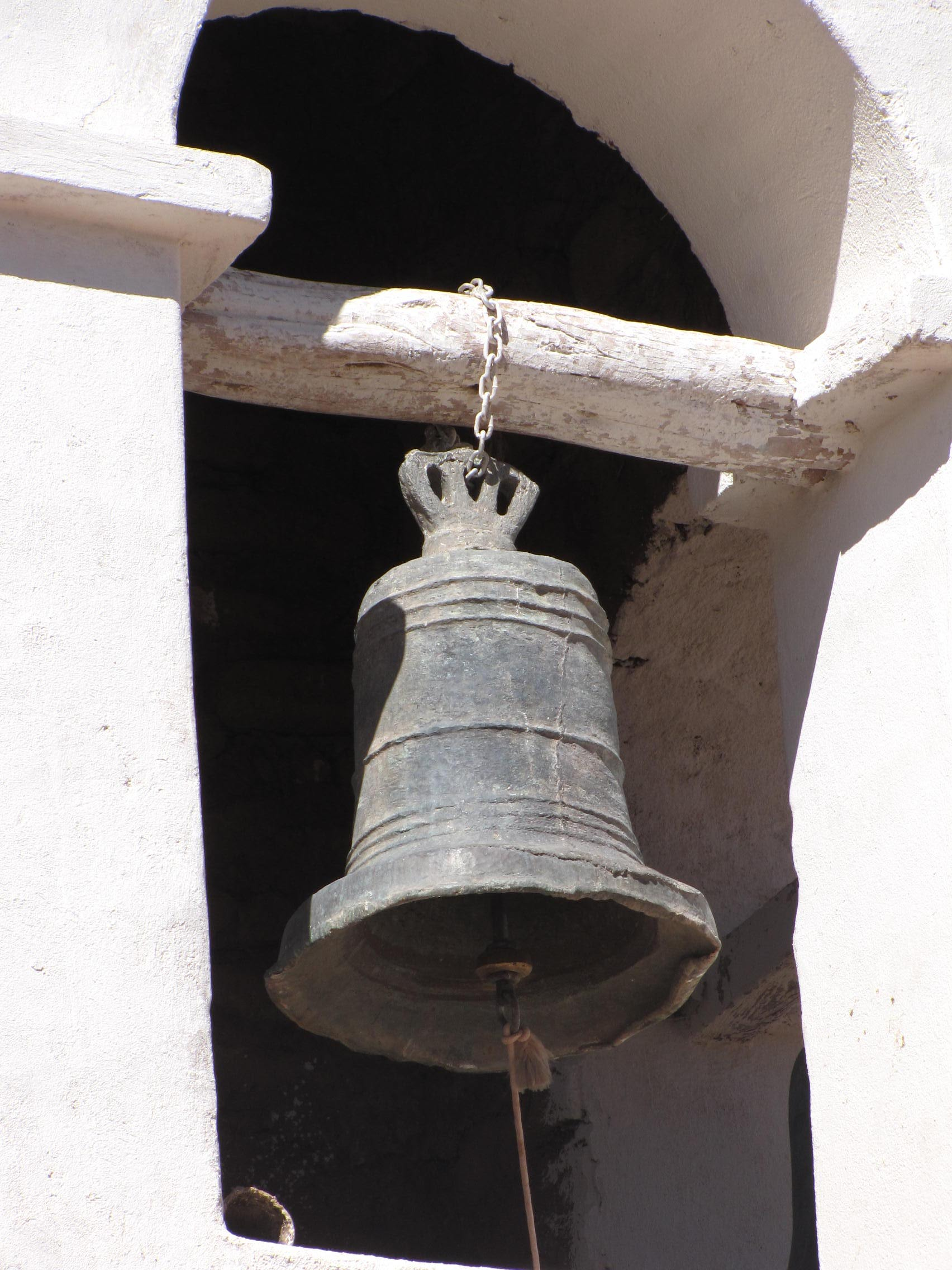 Iglesia de San Pedro de Atacama This is a photo of a national monument in Chile: 301